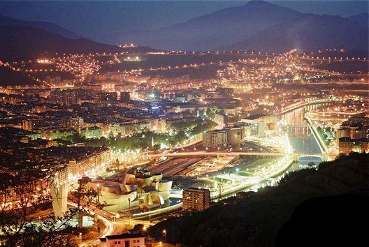 Bilboko Ikuspegia Artxandatik